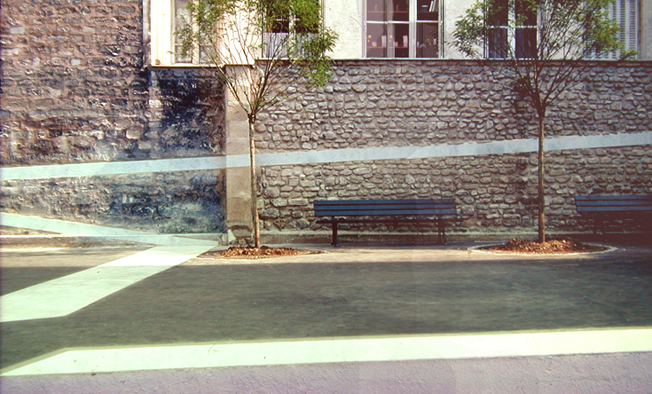 Veu latérale du projet de la place Fréhel, Un carré pour un square